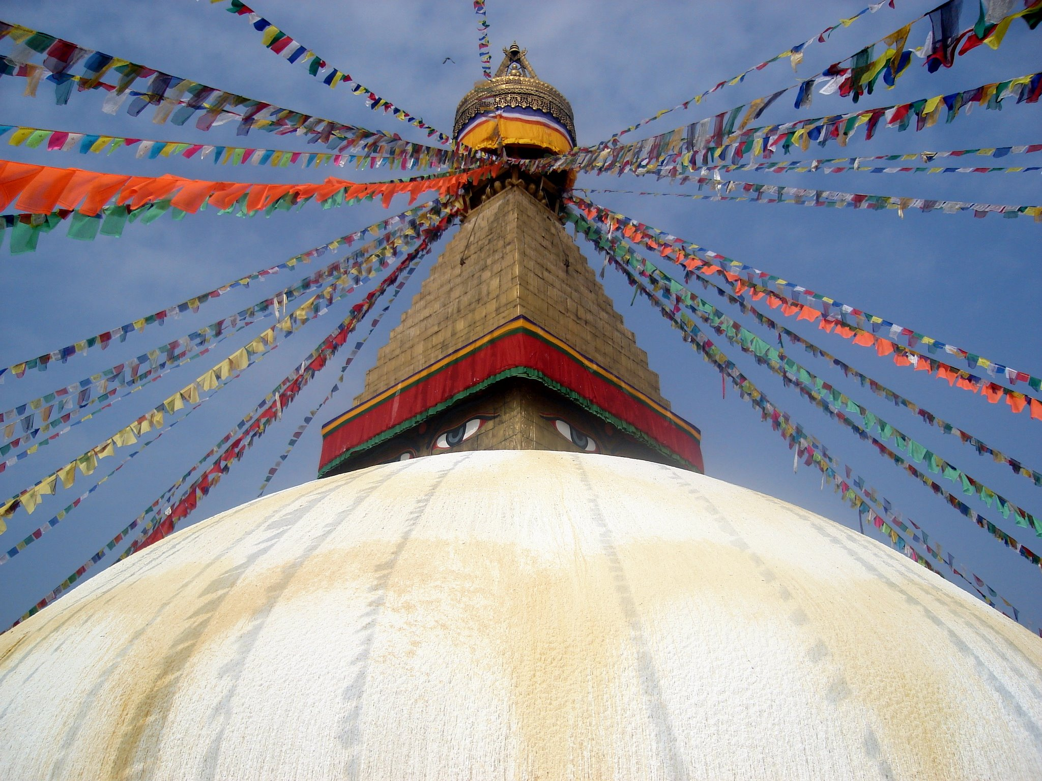 Boudhanath Stupa, Kathmandu